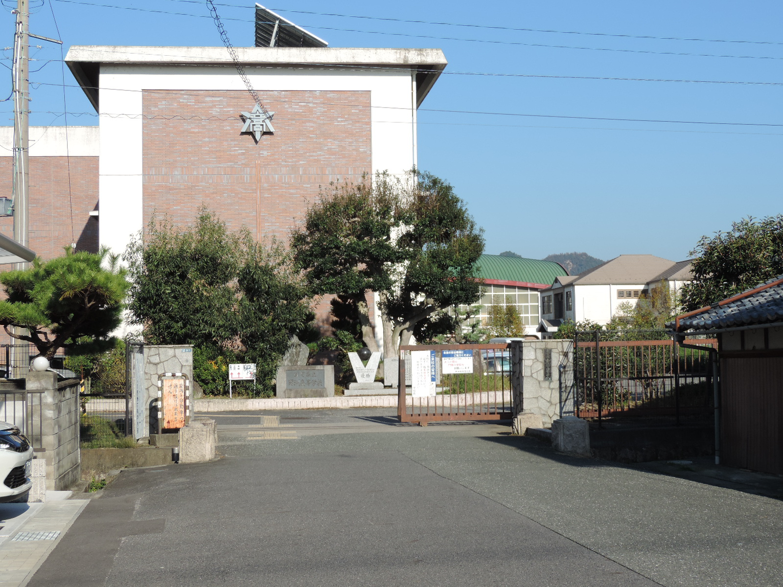 滋賀県立野洲高等学校。2017年撮影